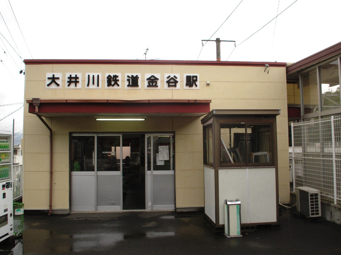 大井川鉄道金谷駅